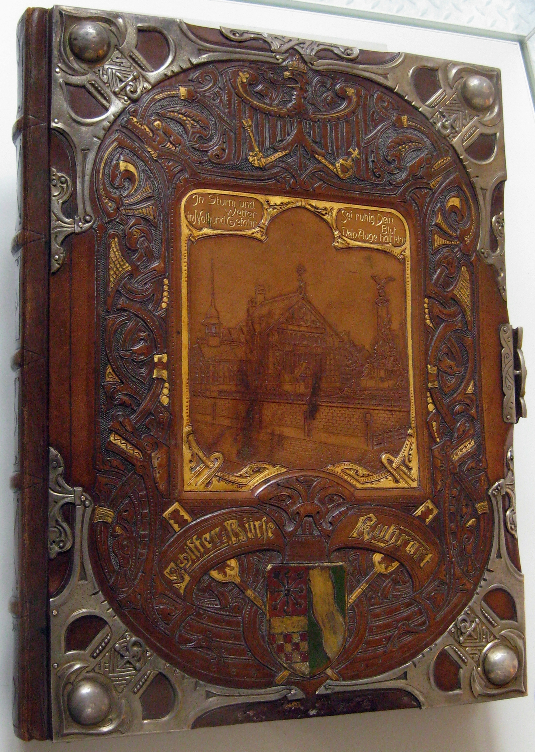 Duisburg, Museum der Deutschen Binnenschifffahrt: Das goldene Buch der Schifferbörse von 1901. Leihgeber: Schifferbörse zu Duisburg. Infotext: Das goldene Schifferbuch ist das einzige originale Objekt der historischen Börse, das ihre Zerstörung 1944 überstand. Das Buch beginnt mit dem Eintrag Kaiser Wilhelm II. und dessen Frau Victoria und beinhaltet vor allem Widmungen von Politikern, Militärs, Unternehmern und Wissenschaftlern von 1902 bis heute.